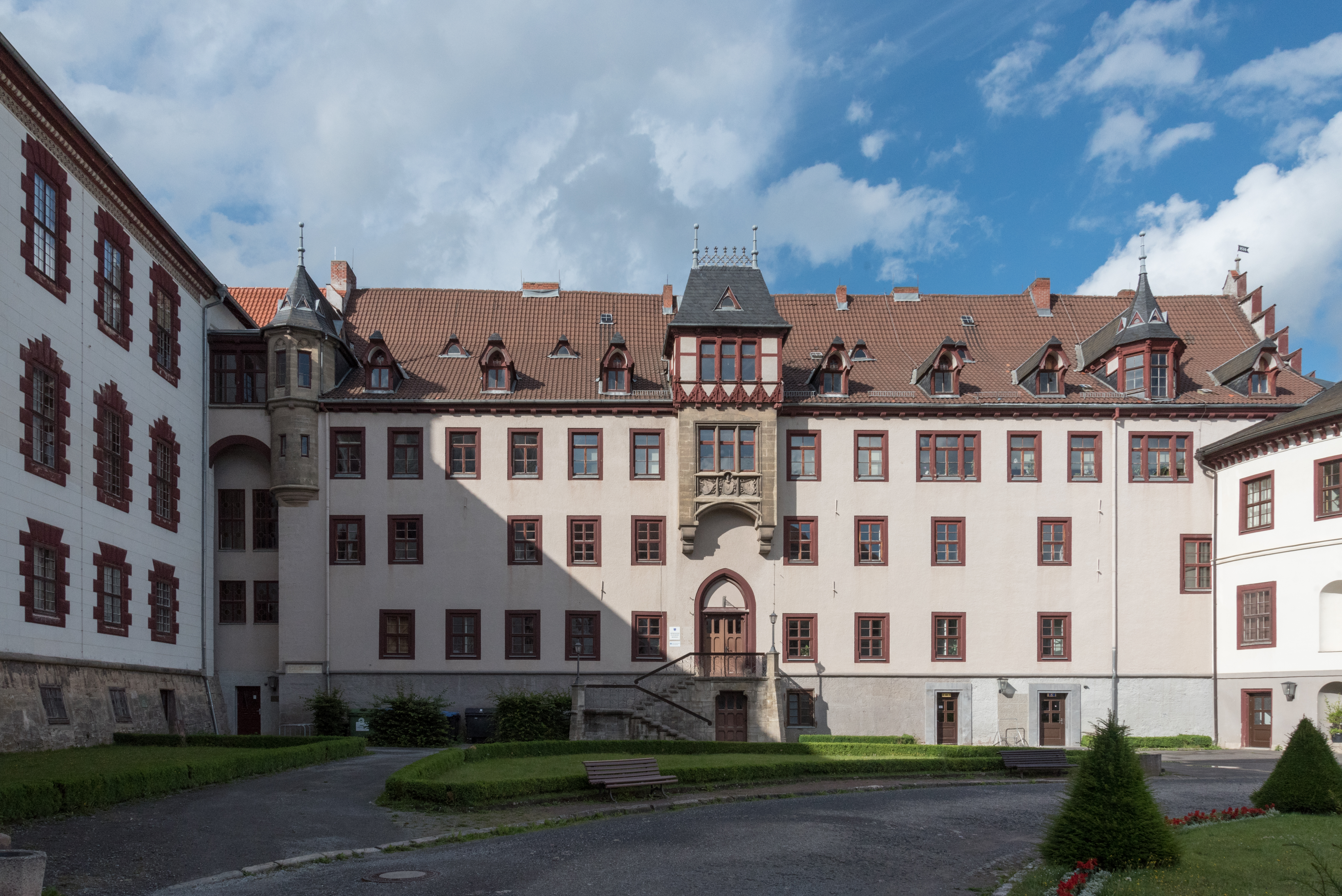 Meiningen, Schloss Elisabethenburg, Exterior